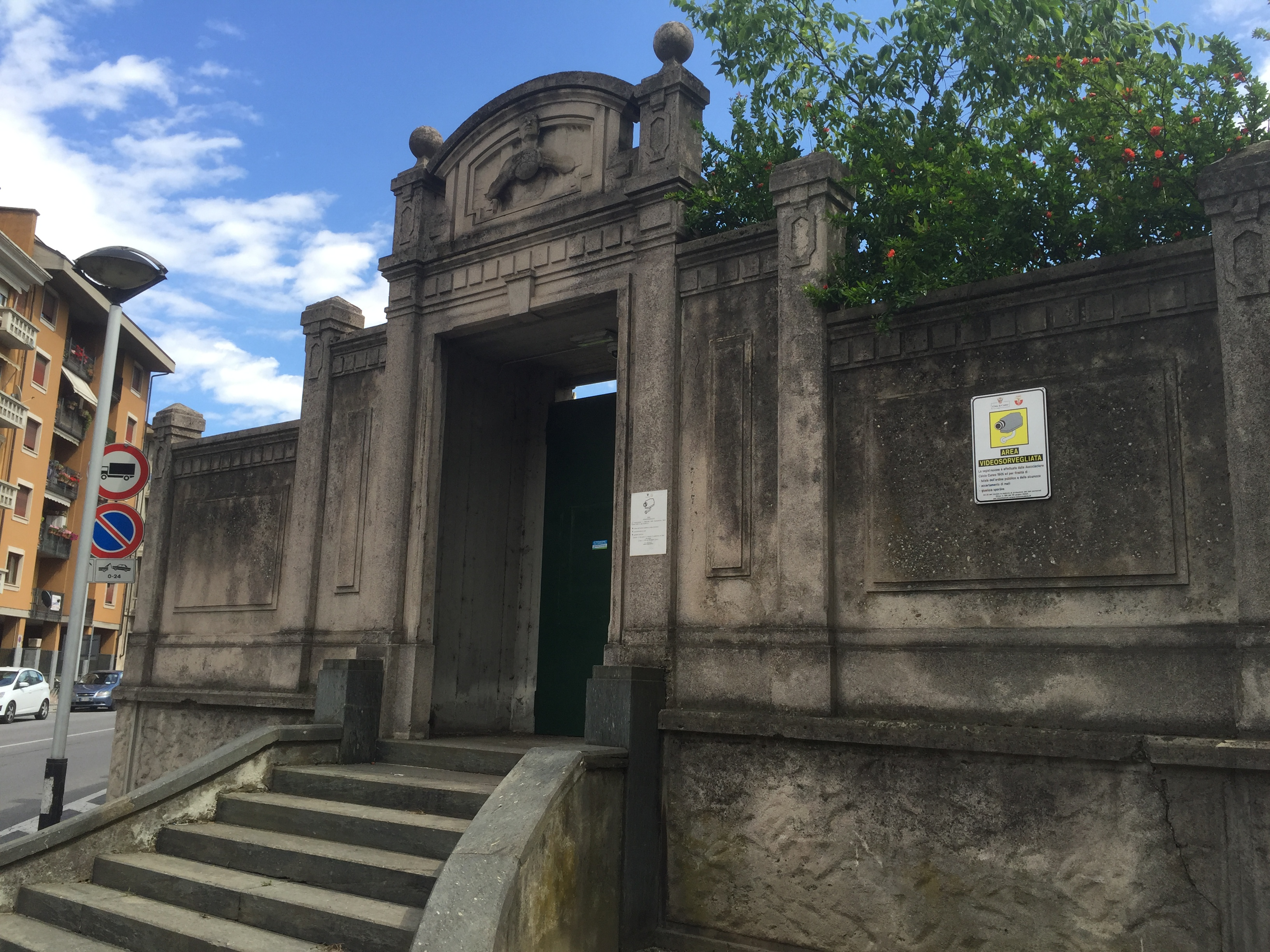 Lo Stadio Fratelli Paschiero della città di Cuneo